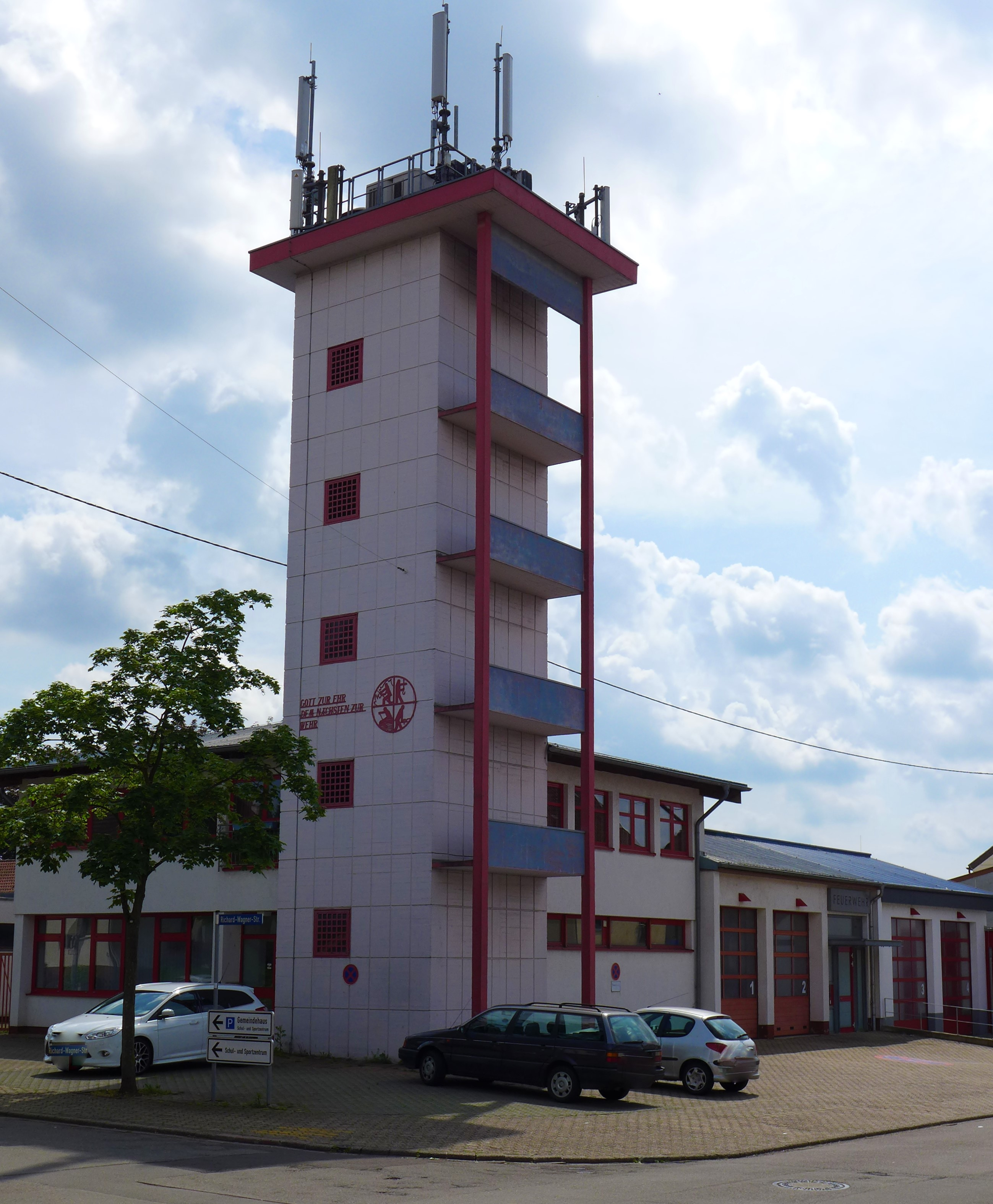 Diefflen, Feuerwehrhaus